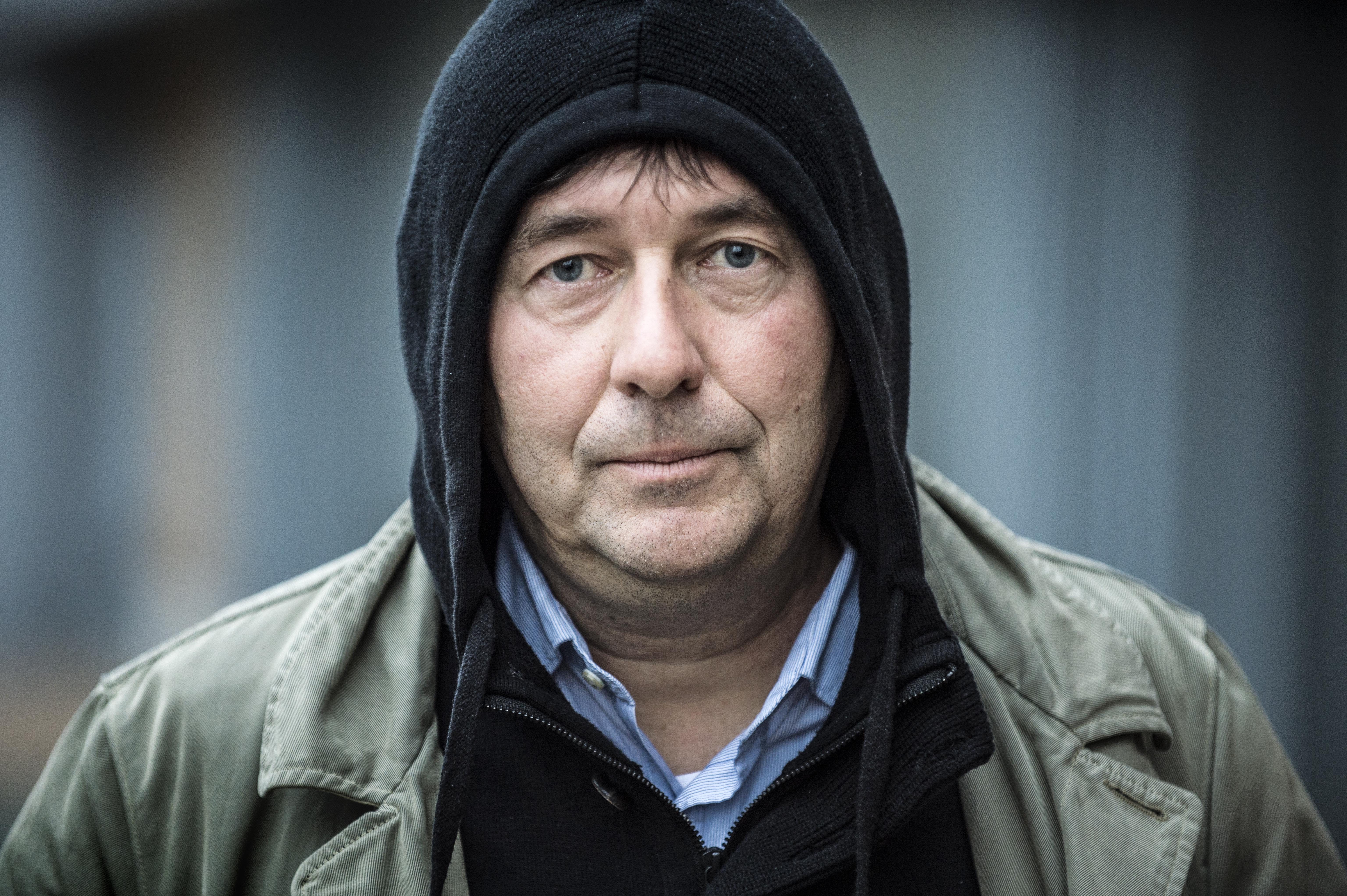 Rudi Vranckx, Vlaams journalist en werkt voor het VRT Nieuws.